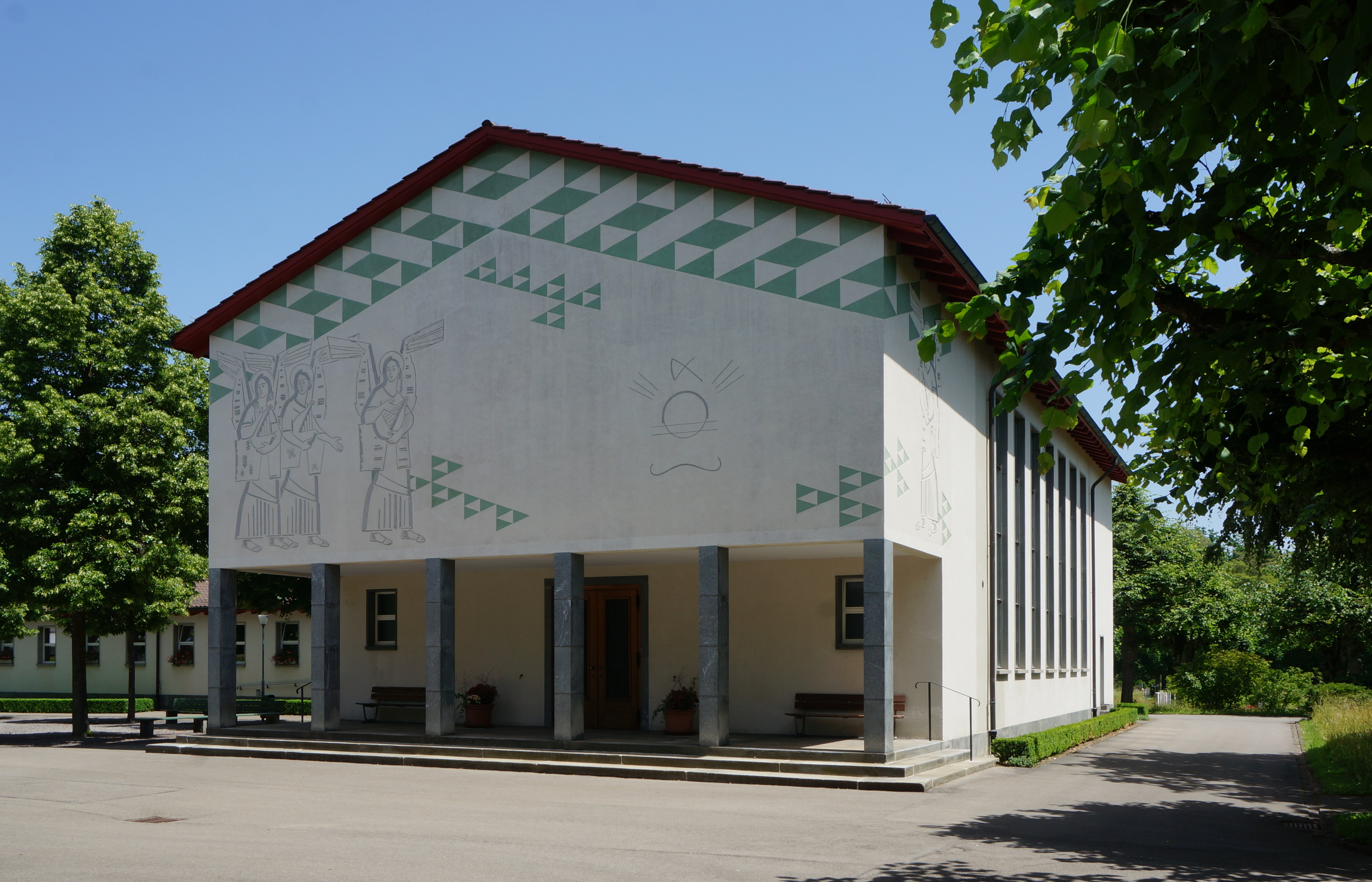 Bern, Schosshaldenfriedhof, Gebäude Ostermundigenstrasse 118 mit Sgraffito ohne Titel von 1939 von Louis Moilliet (1880–1962).